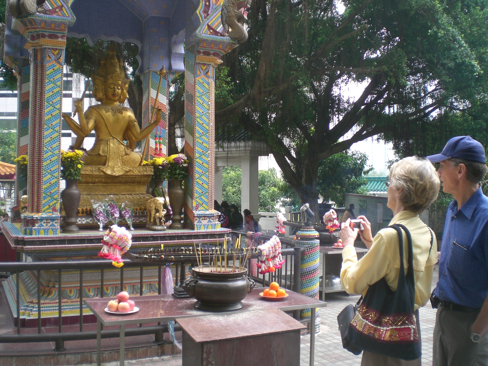 沙田寶福山園內環境 四面佛